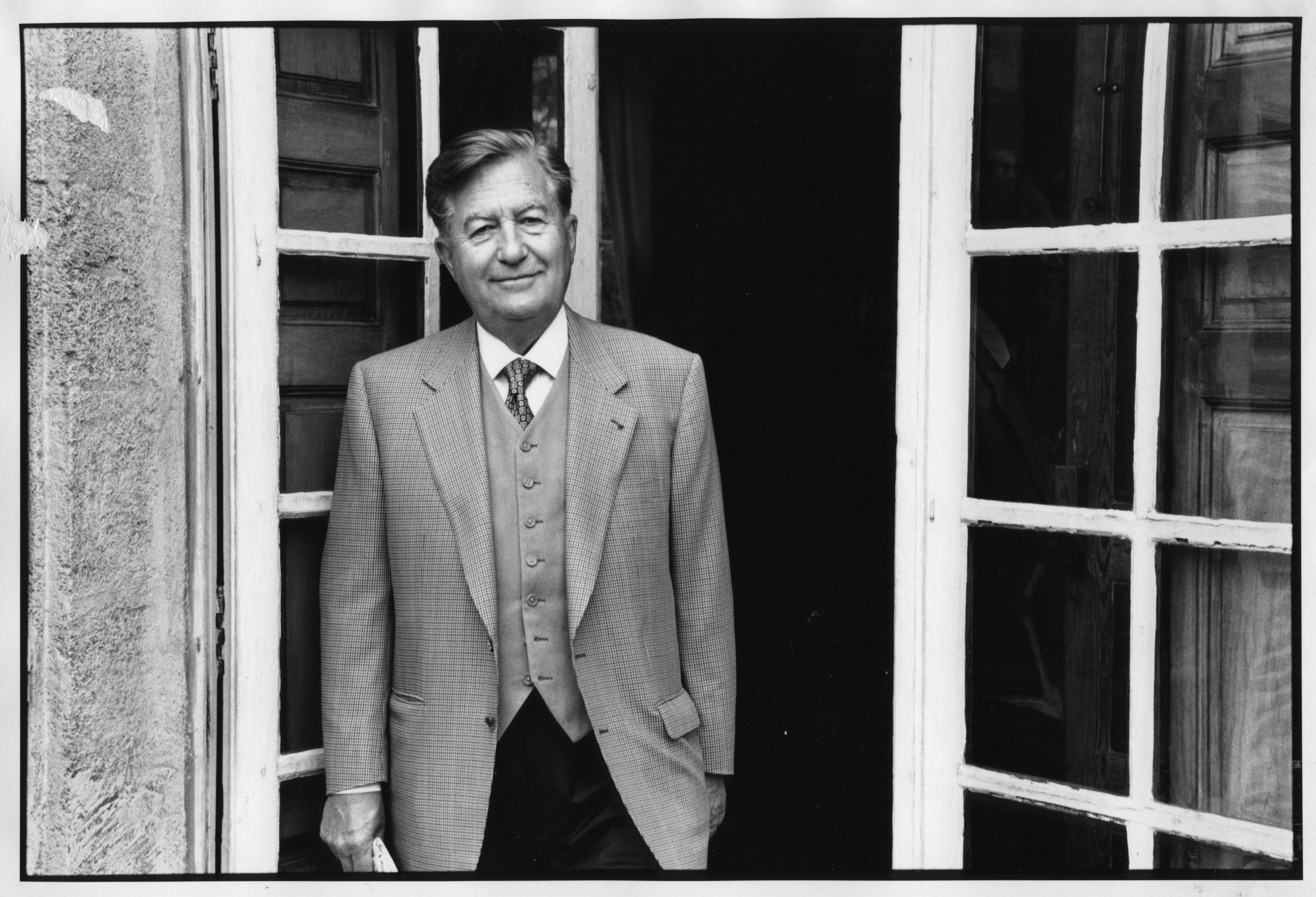 Ambassadeur de France, ancien ministre des Affaires étrangères, député d'Aix-en-Provence et du pays d'Aix, à Aix-en-Provence en 1997